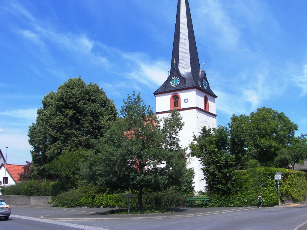 Kirche im Kulmbacher Ortsteil Melkendorf